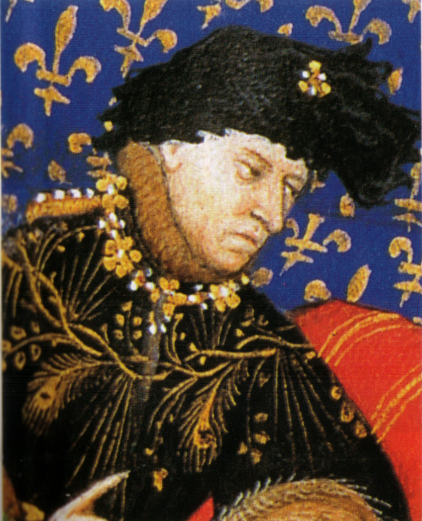 Carlo VI di Francia